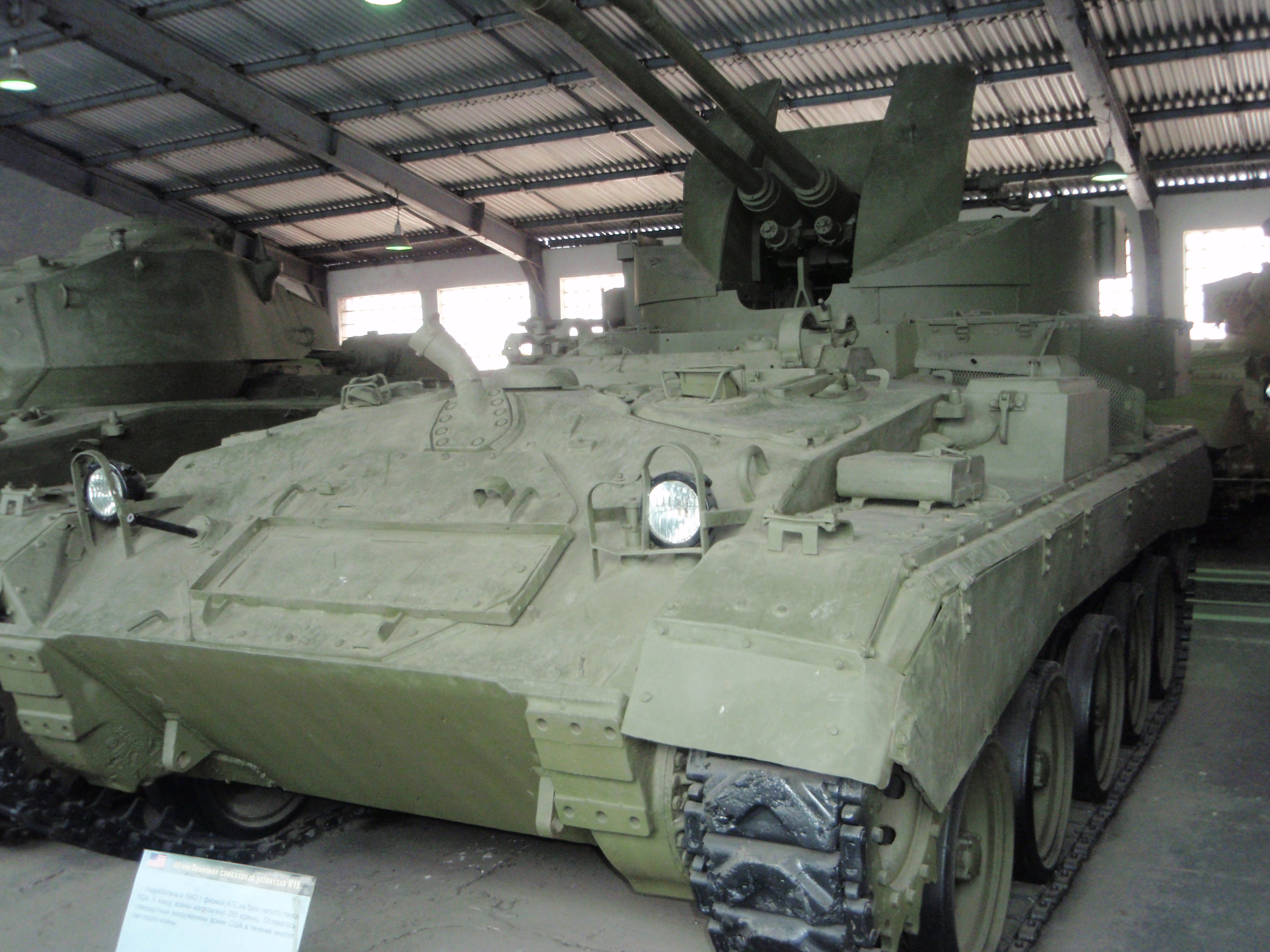 Американская ЗСУ M19 в Кубинке